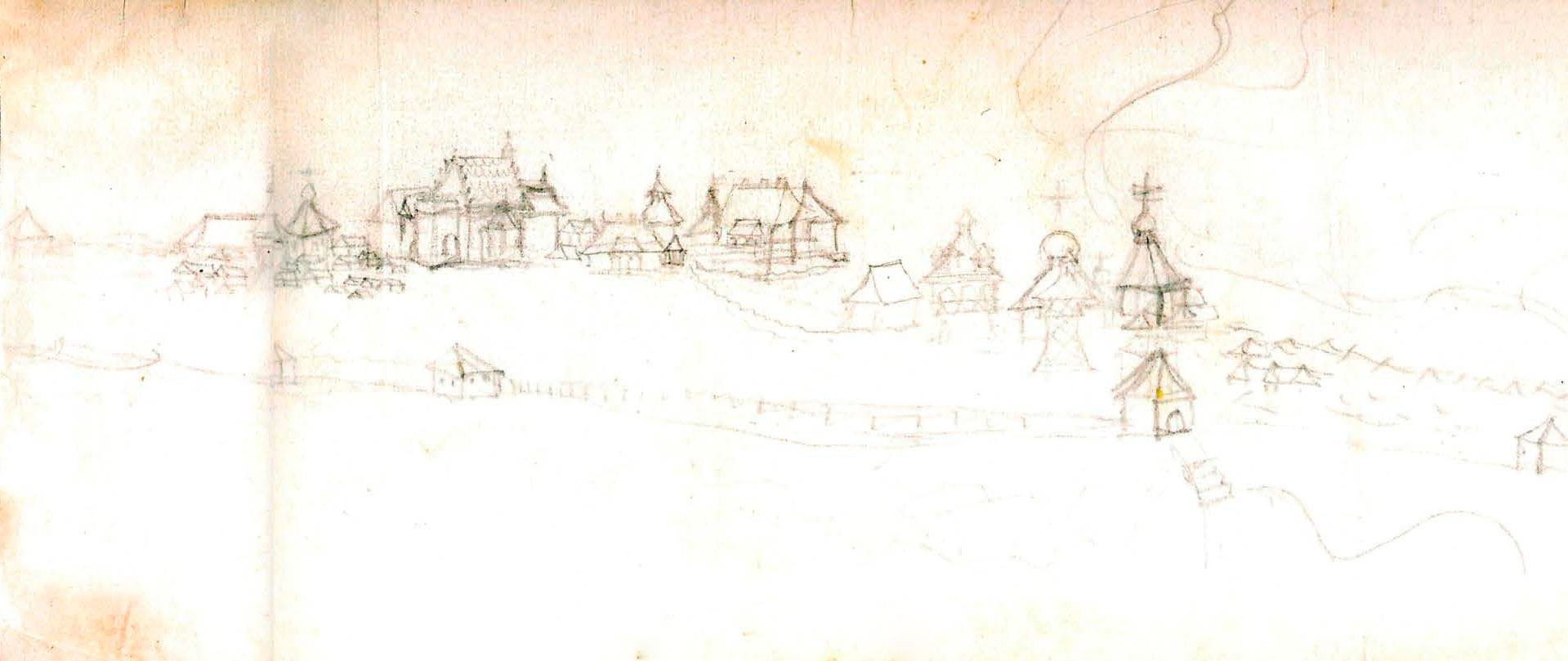 Беларуская (тарашкевіца): Барысаў (Barysaŭ) (?)